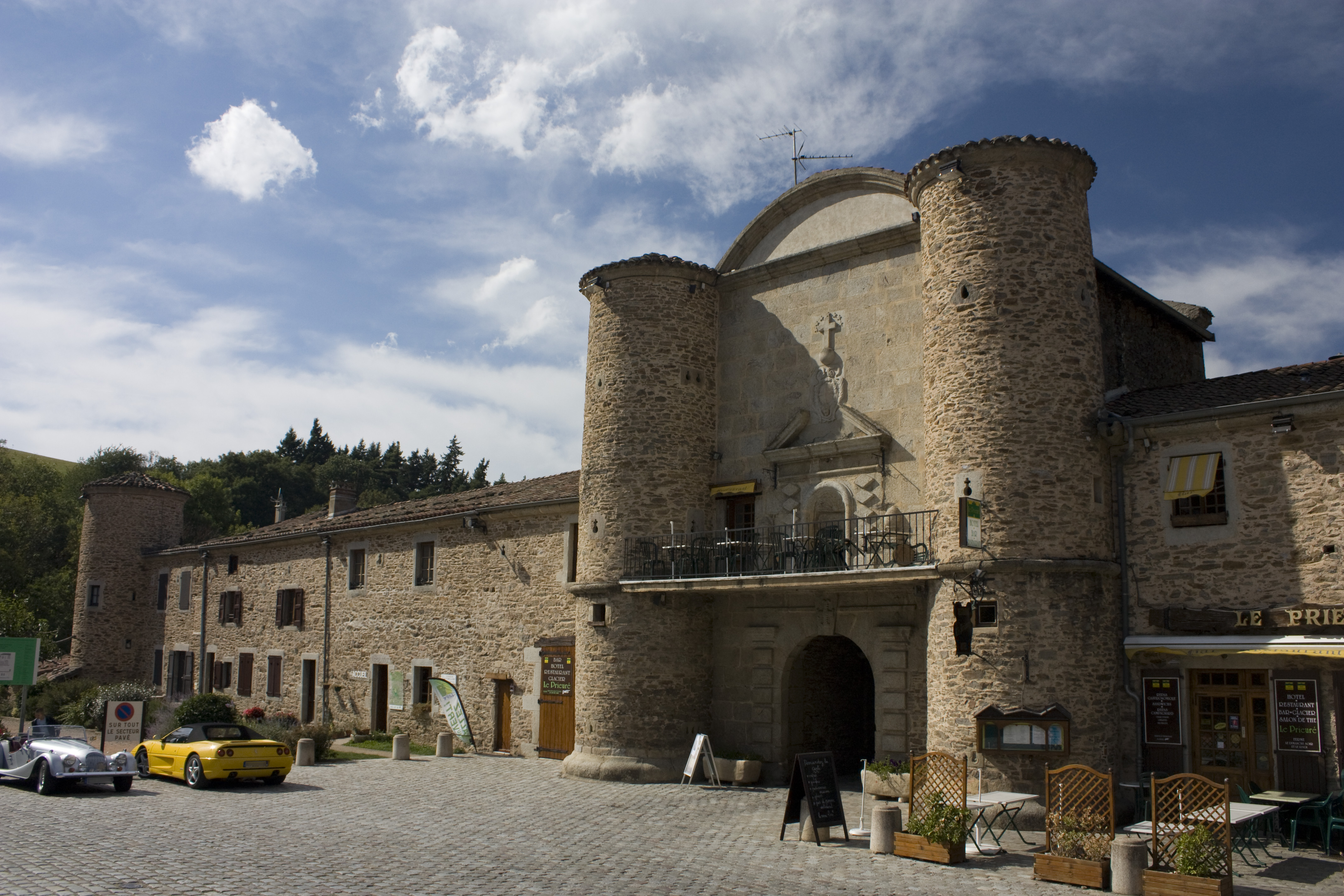 L'aile ouest de la façade sud. La petite porte après la Porte fortifiée est la boulangerie qui abrite encore son four à pain. Aujourd'hui elle lle abrite l'Accueil.